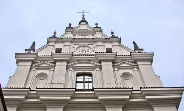 Varsavia, chiesa gesuita di Santa Maria Misericordiosa (sanktuarium Matki Bozej Łaskawej), nella Città Vecchia (Stare Miasto), facciata sulla via Świętojańska, parte superiore.